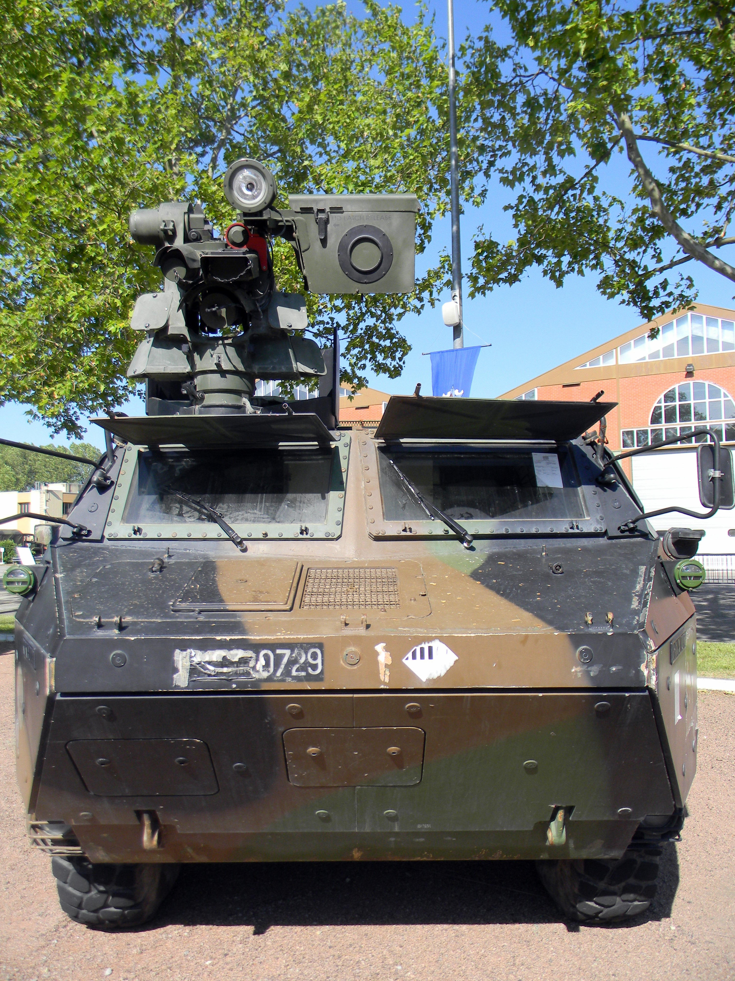 Journées portes ouvertes du quartier général Sabatier à Lyon le 15 et 16 juin 2013.